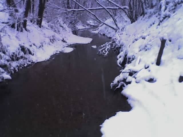 Felsőszölnök creek, winter 2006